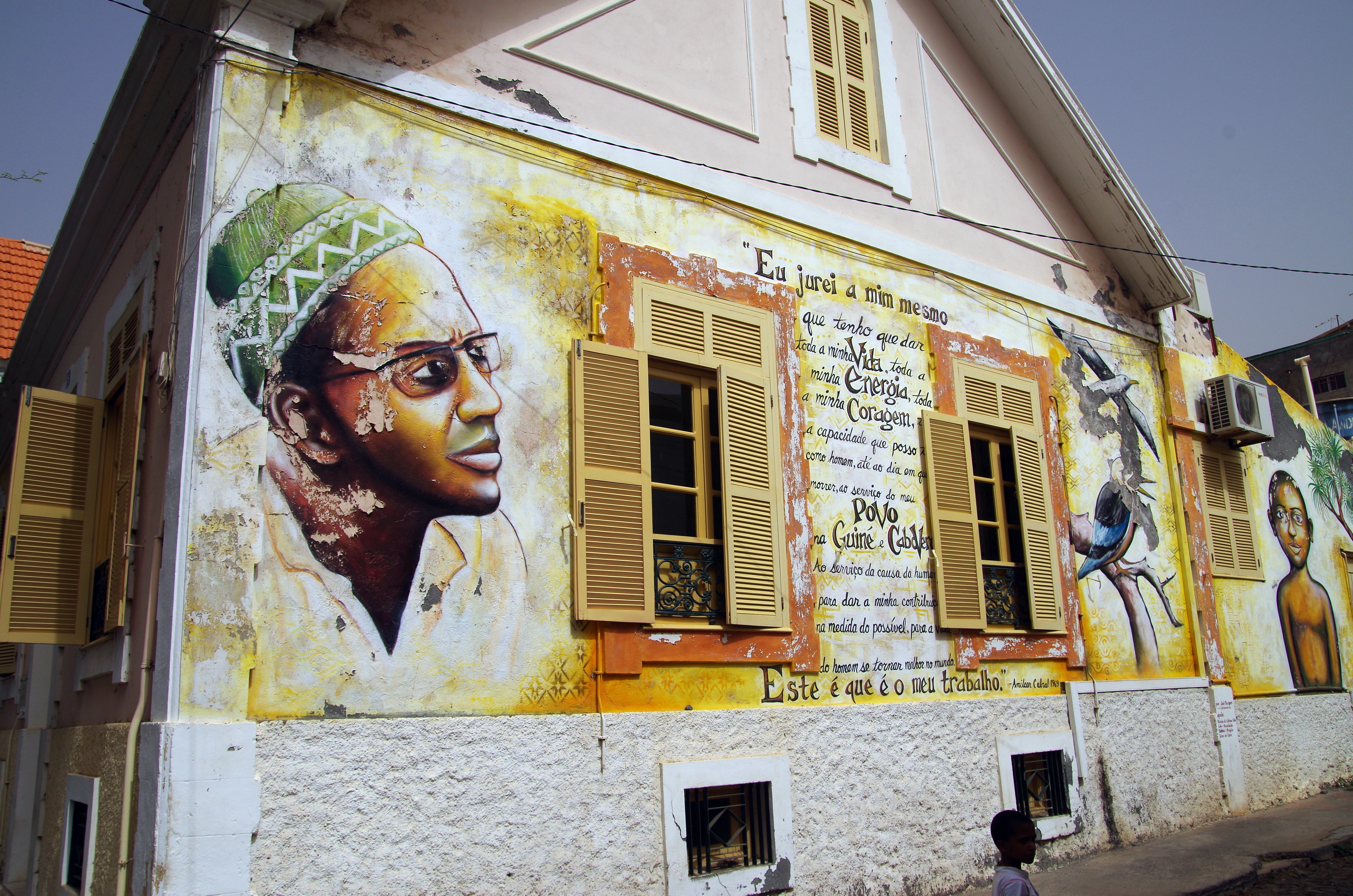 Fundação Amílcar Cabral, Praia